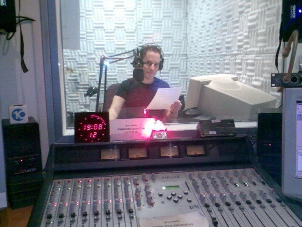 חיים גיל באולפני חדשות 10